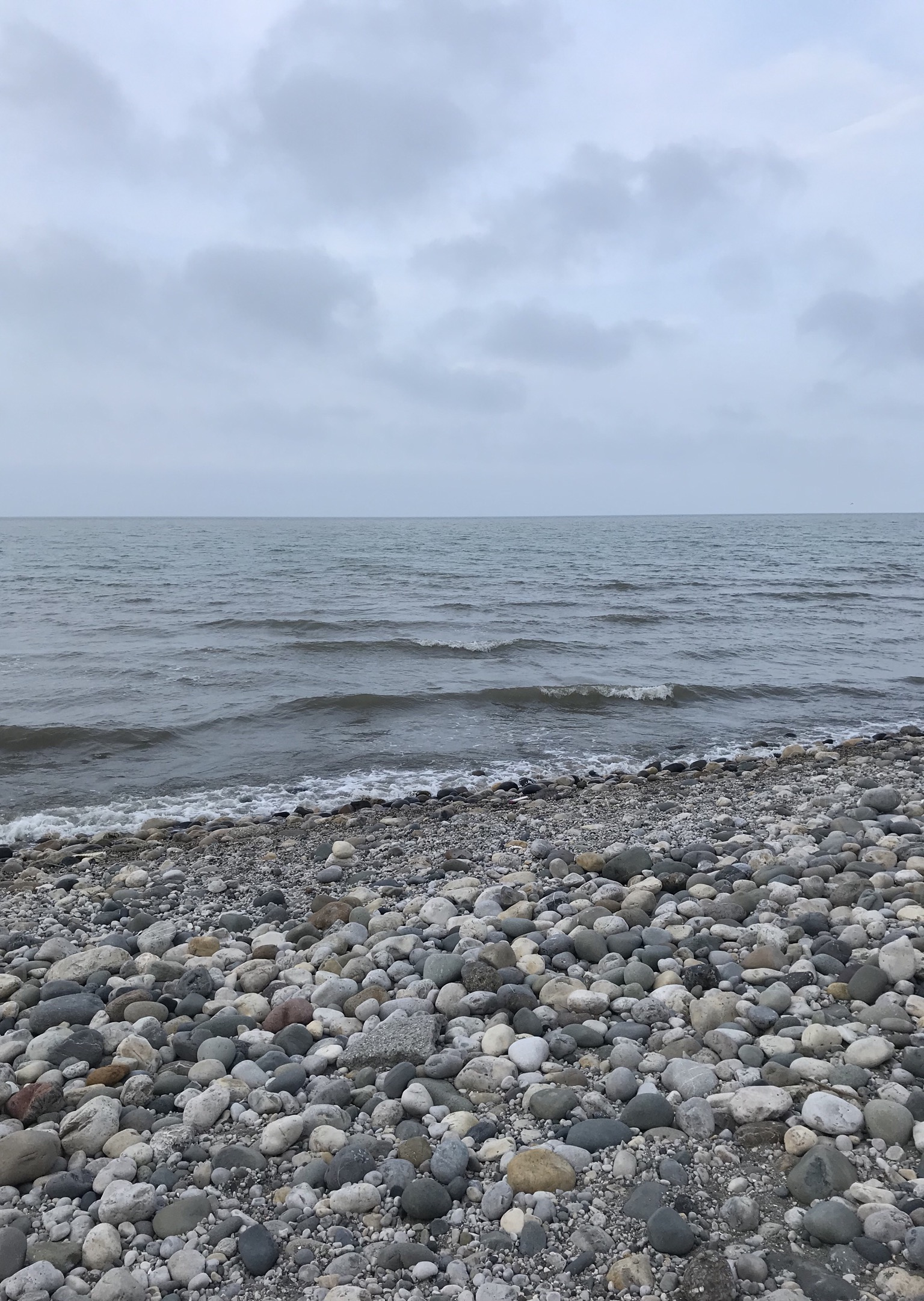 ساحل سنگی چابکسر